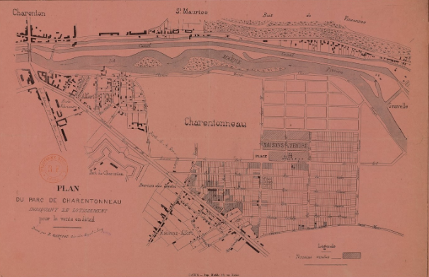 Plan représentant le parc de Charentonneau et ses parcelles à la fin du XIXe siècle.